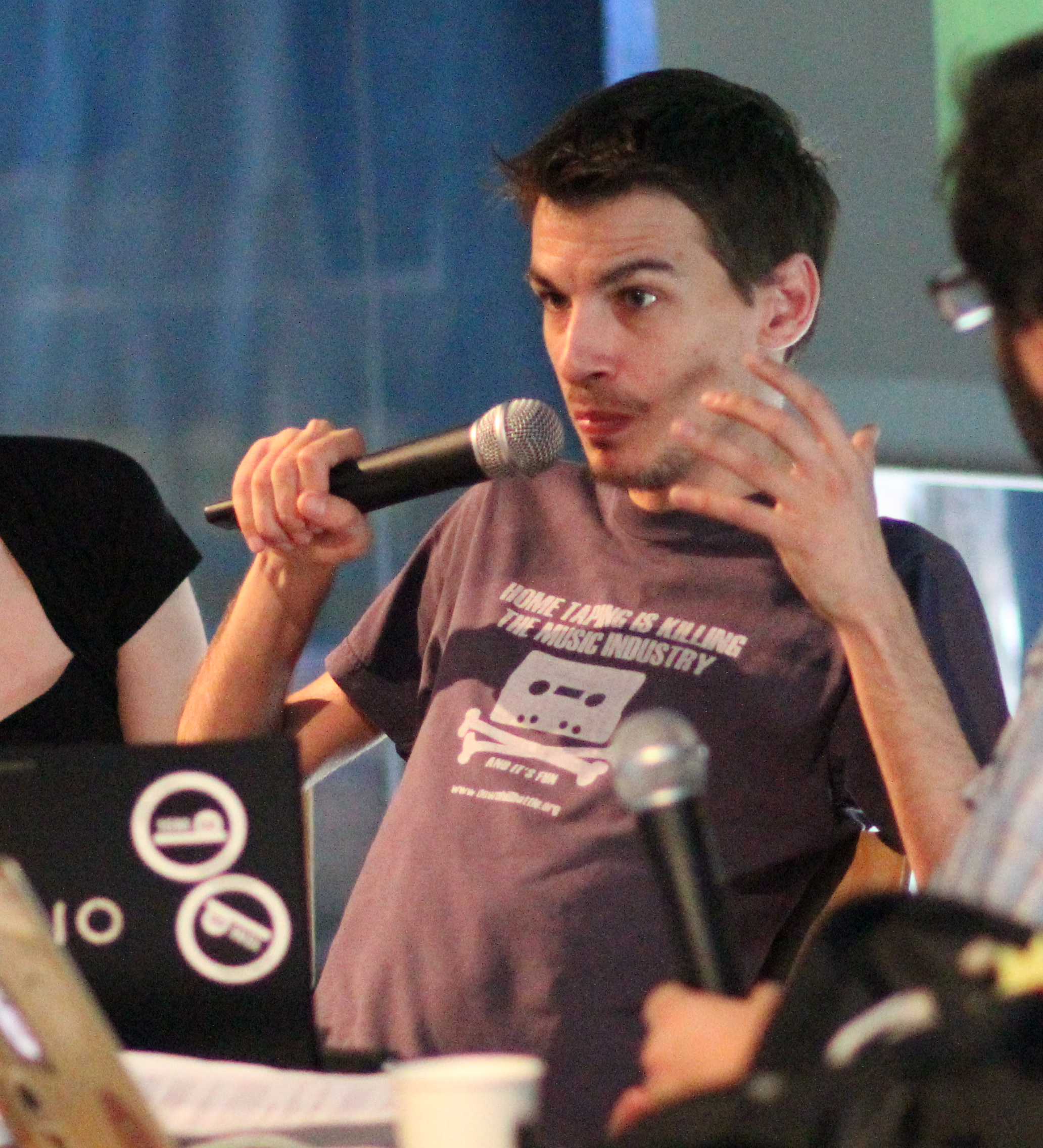 Quinto encuentro del grupo de trabajo 15M.cc.